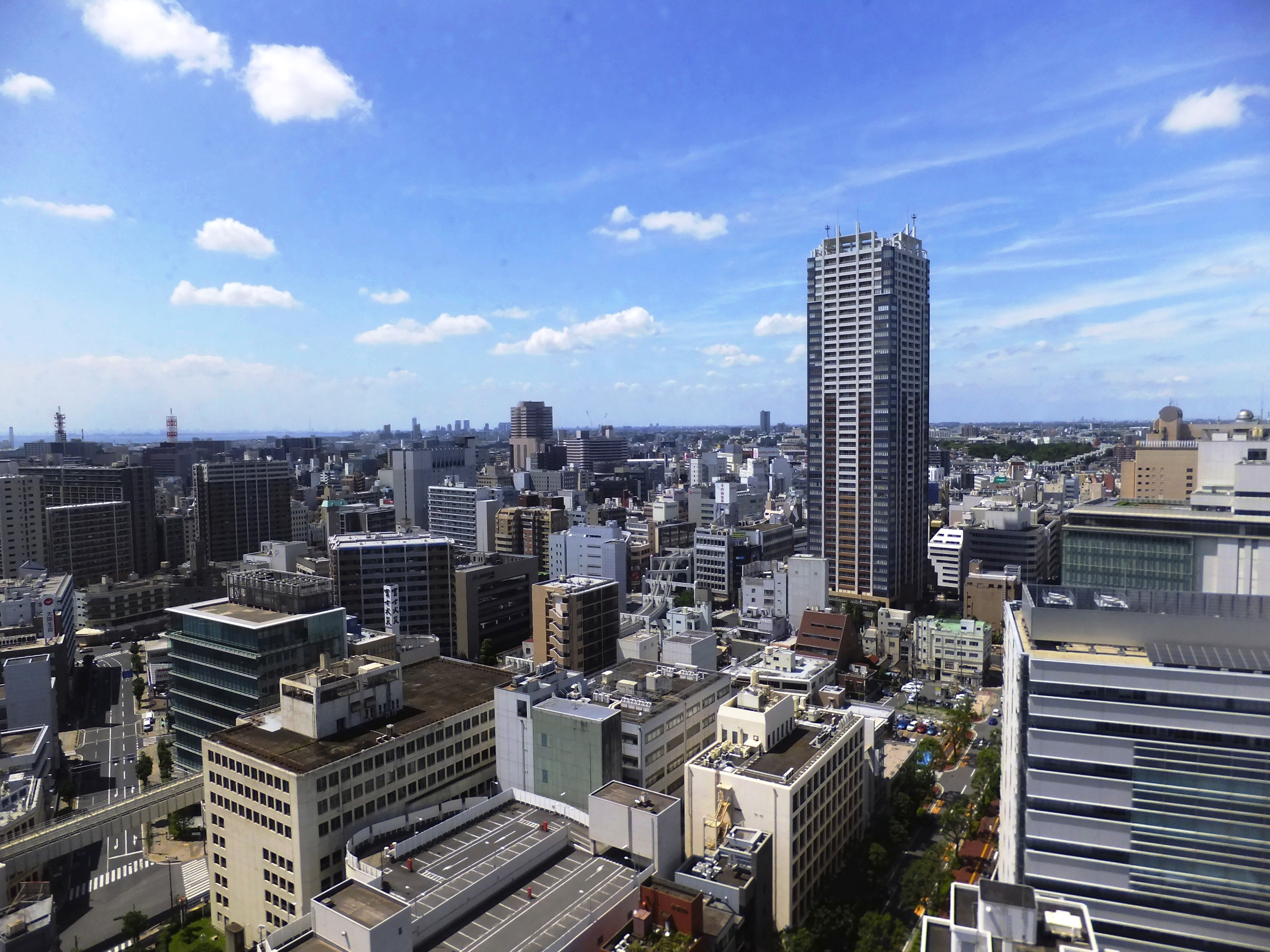 千葉県庁本庁舎からの眺め、千葉市中心街方向